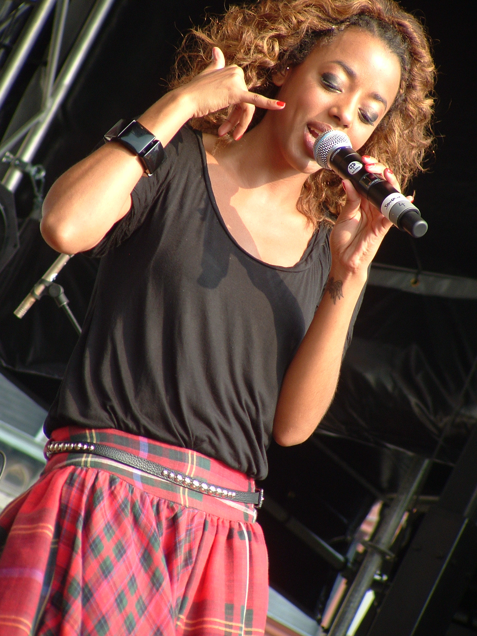 Sandrine Van Handenhoven tijdens een optreden op Flikkendag 2008.